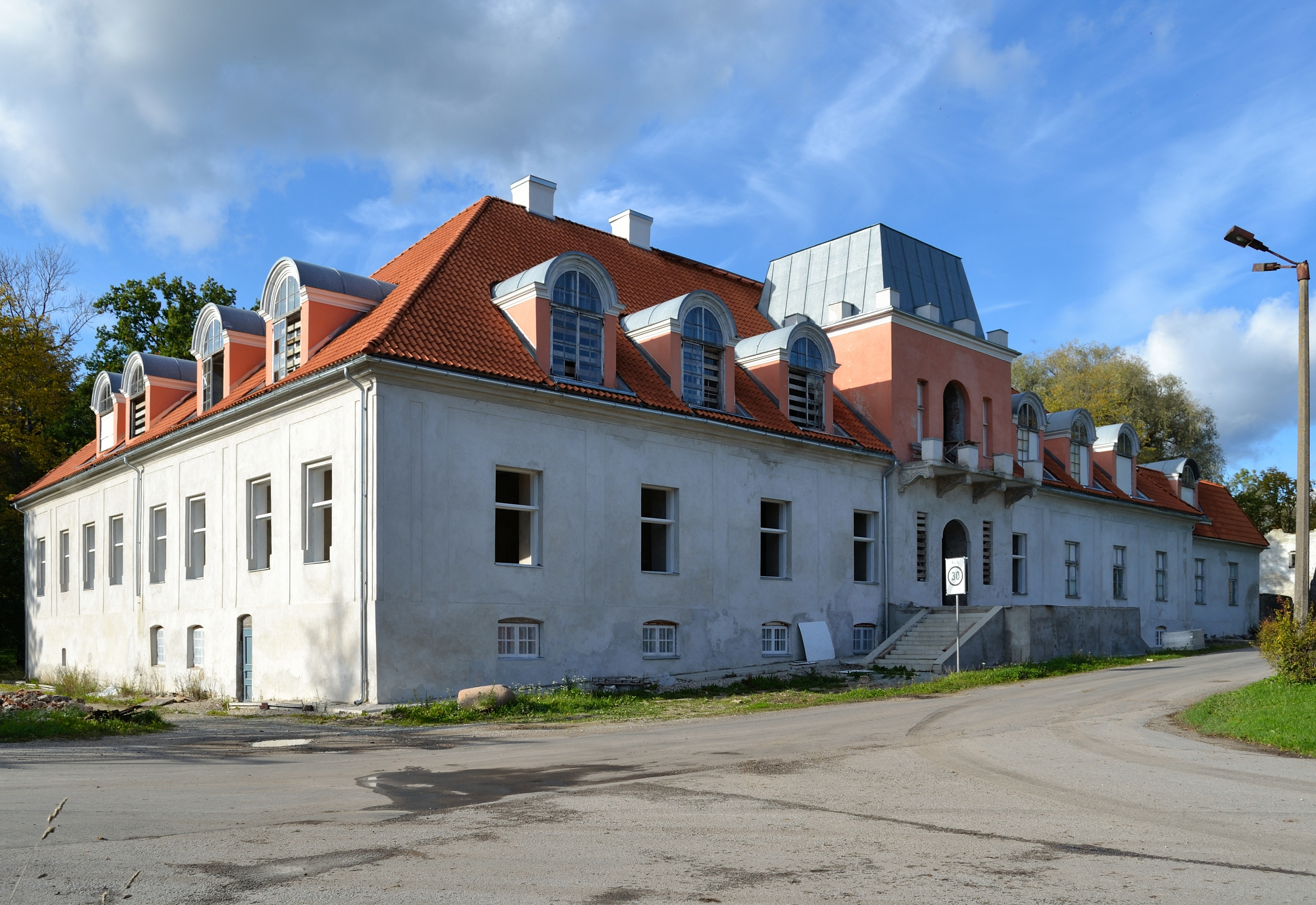 Ingliste mõisa peahoone